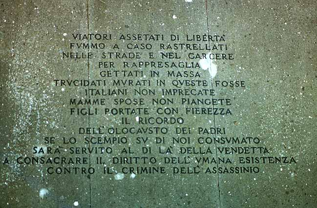 Iscrizione commemorativa all'interno delle Fosse Ardeatine.